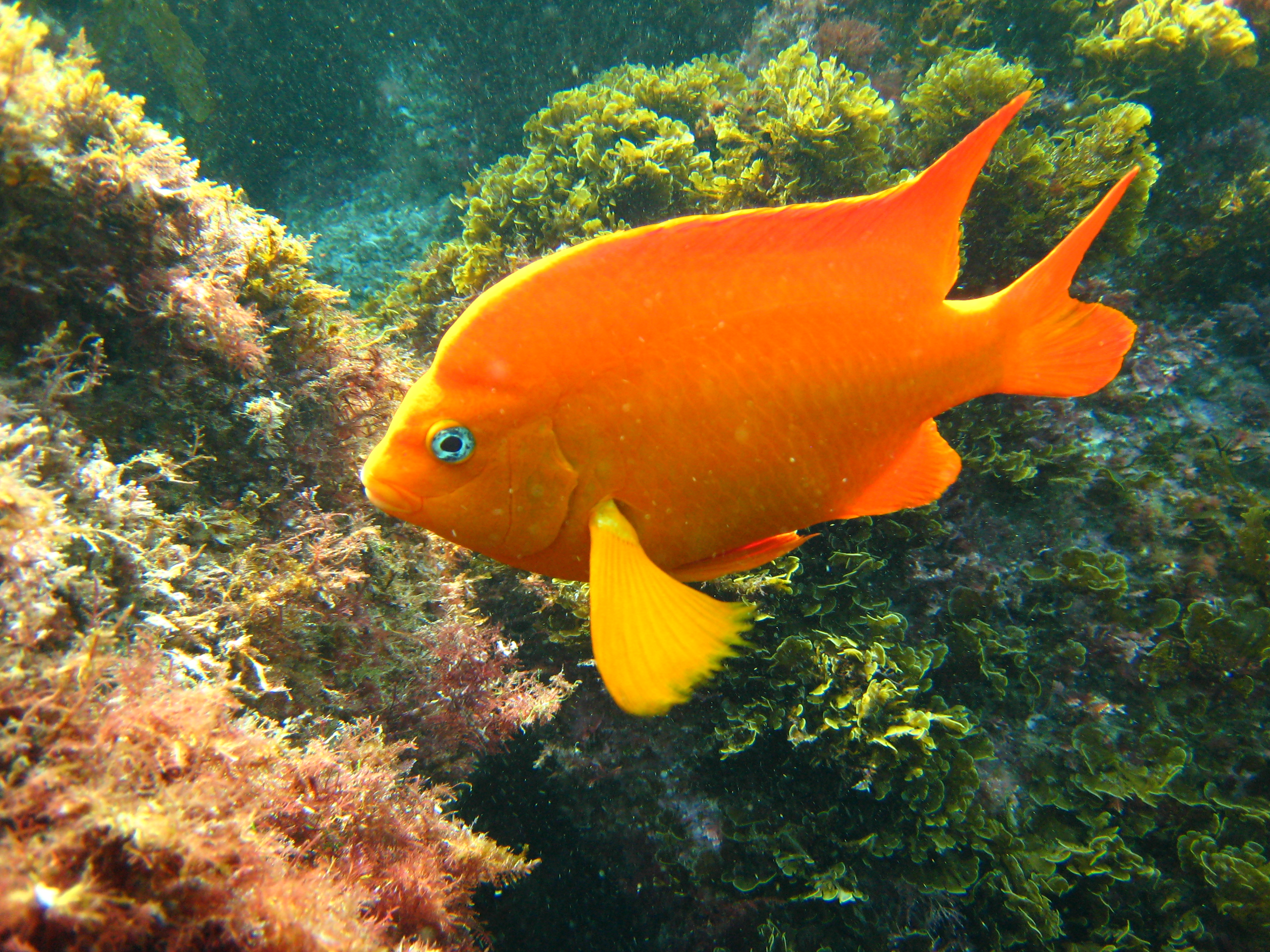 Garibaldi fish in Catilina, California